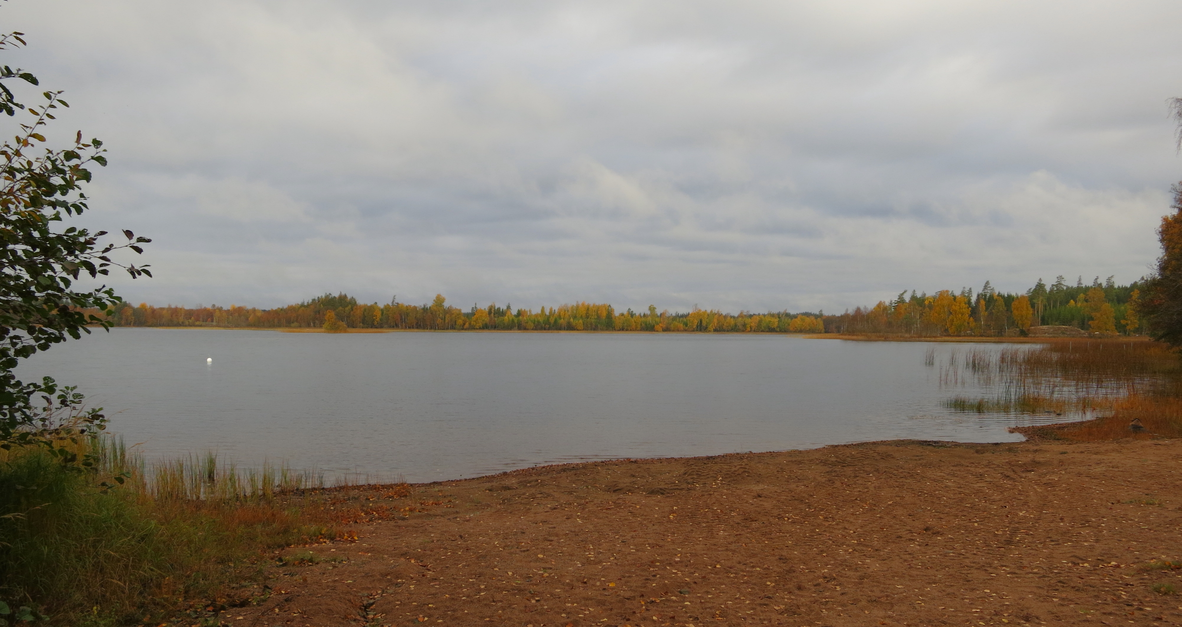 Sjön Djupasjön, Tingsryds kommun